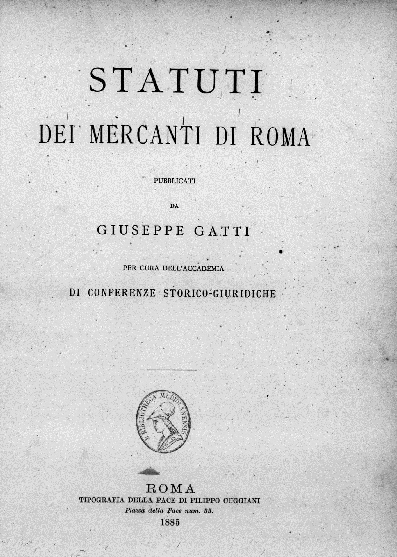 Frontespizio